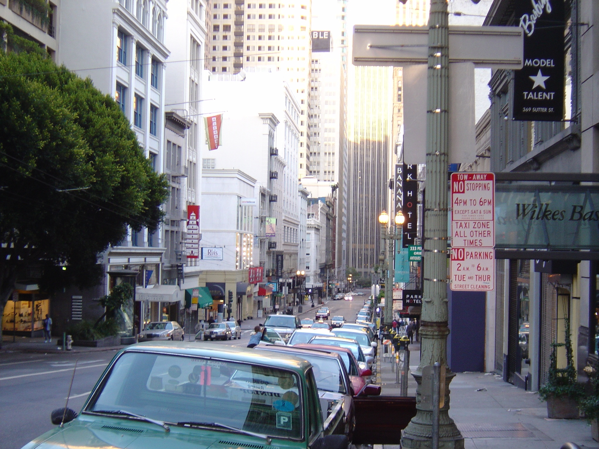 In den Straßen von San Francisco